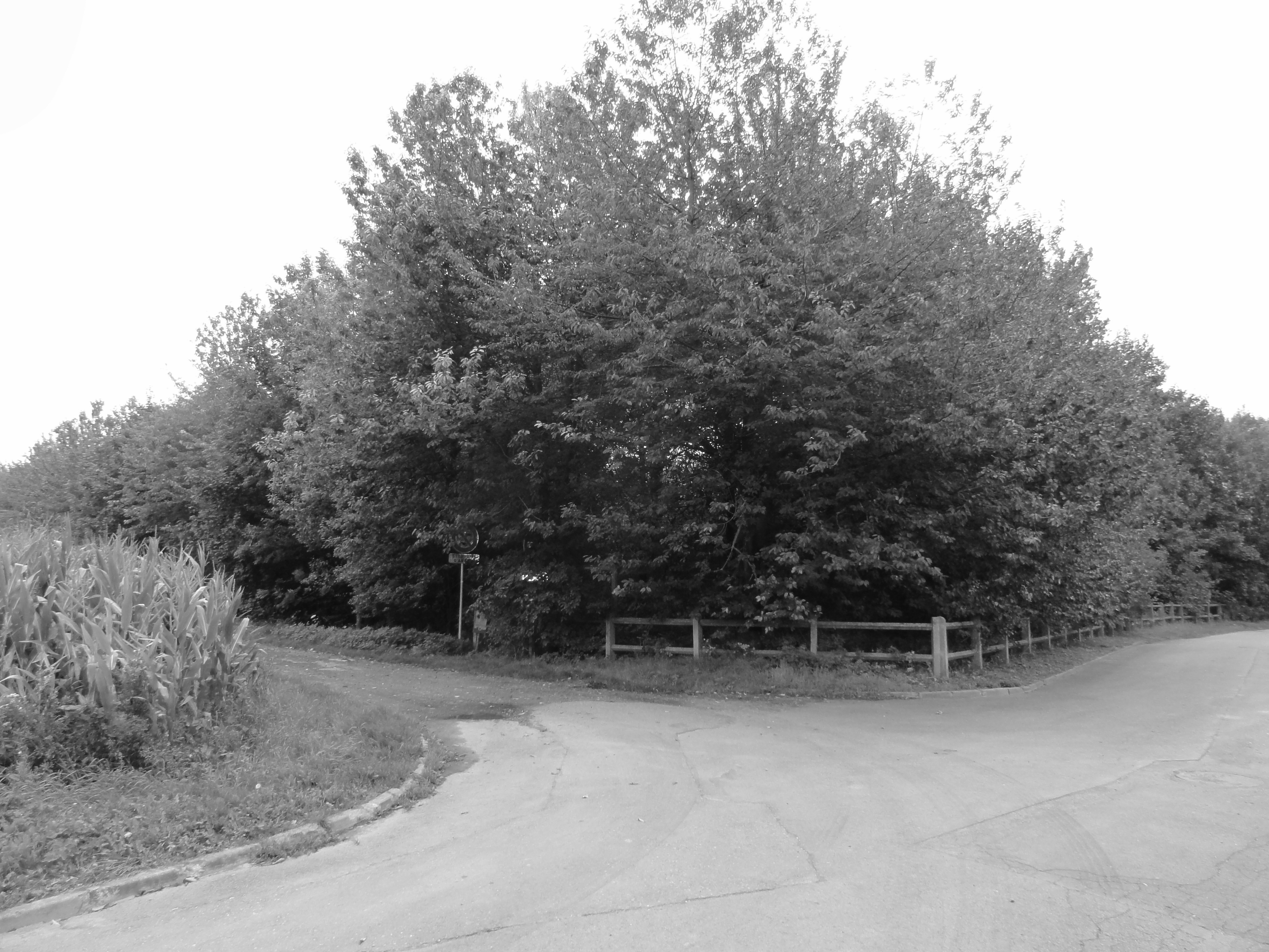 Terril n° 67 dit 13 bis de Lens, Fosse n° 13 bis de la Compagnie des mines de Lens, Bénifontaine, Pas-de-Calais, Nord-Pas-de-Calais, France.